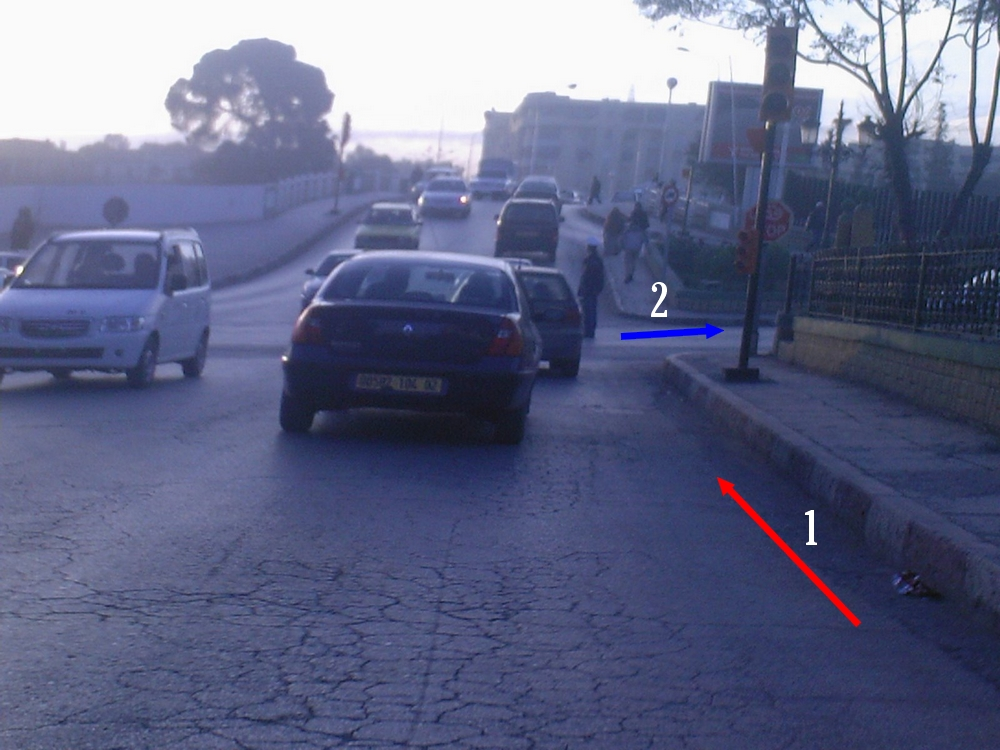 صورة لتقاطع شارعي بن باديس و شارع أول نوفمبر